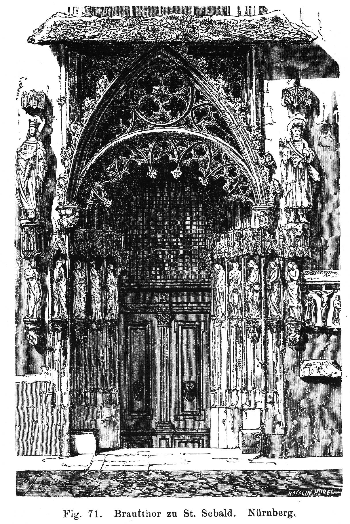 Fig. 71. Brautthor zu St. Sebald. Nürnberg. aus Reallexicon der Deutschen Altertümer. Ein Hand- und Nachschlagebuch der Kulturgeschichte des deutschen Volkes bearbeitet von Dr. E. Götzinger. Zweite vollständig umgearbeitete Auflage mit 157 Illustrationen. Leipzig: Verlag von Woldemar Urban, 1885.